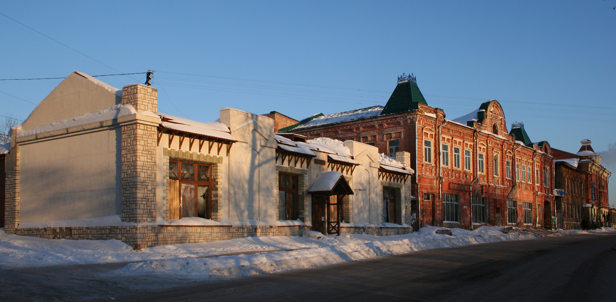 Томск, улица Обруб 6 и 8